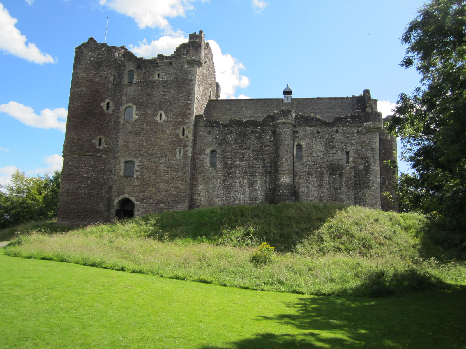 Castello di Doune, fronte ingresso